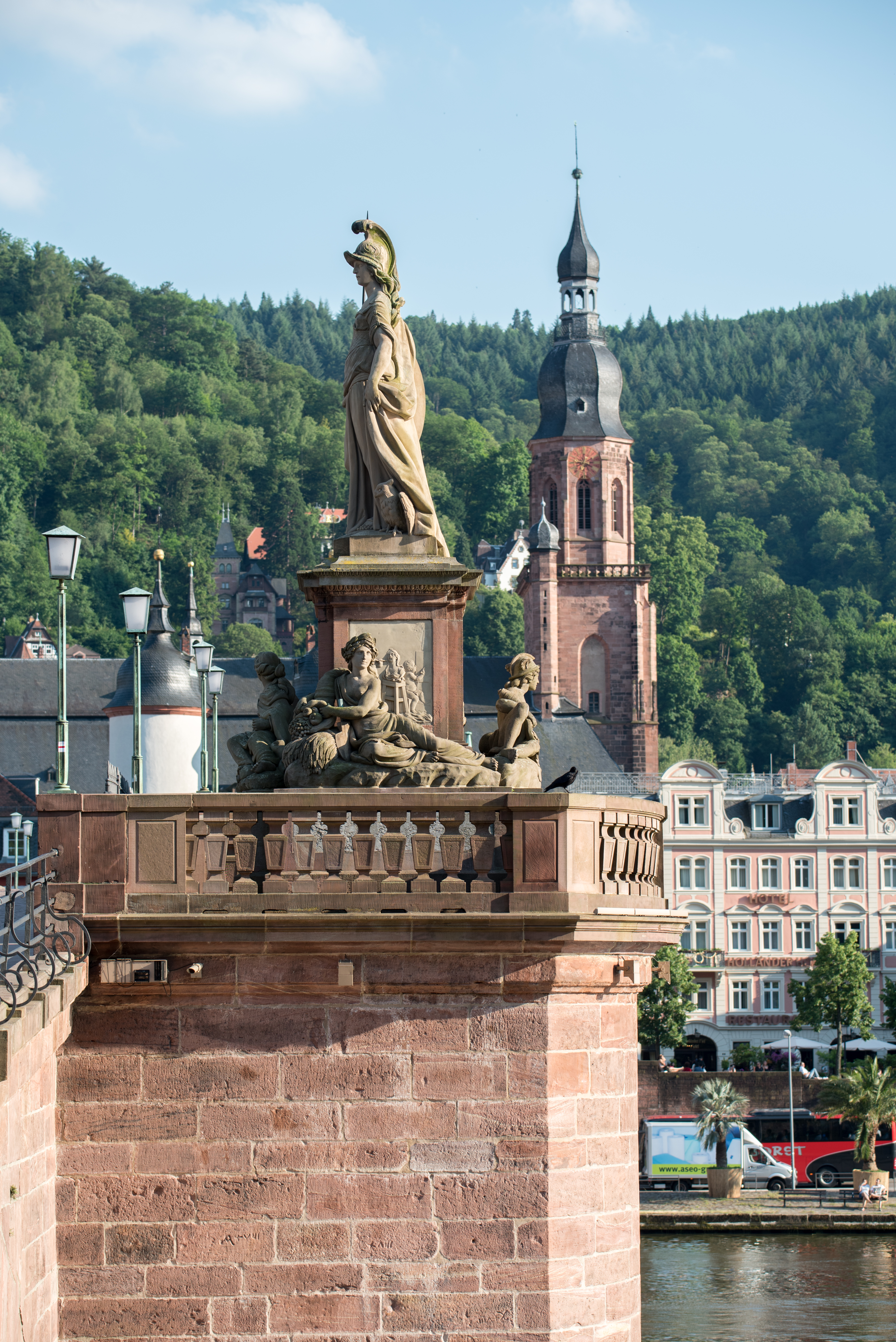 Heidelberg, Alte Brücke, Heiliggeistkirche